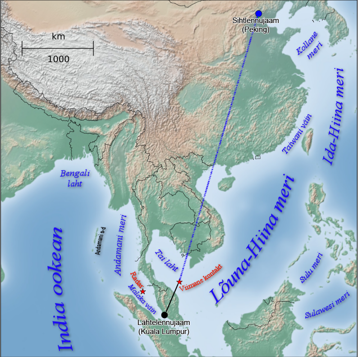 Malaysia Airlinesi lend 370